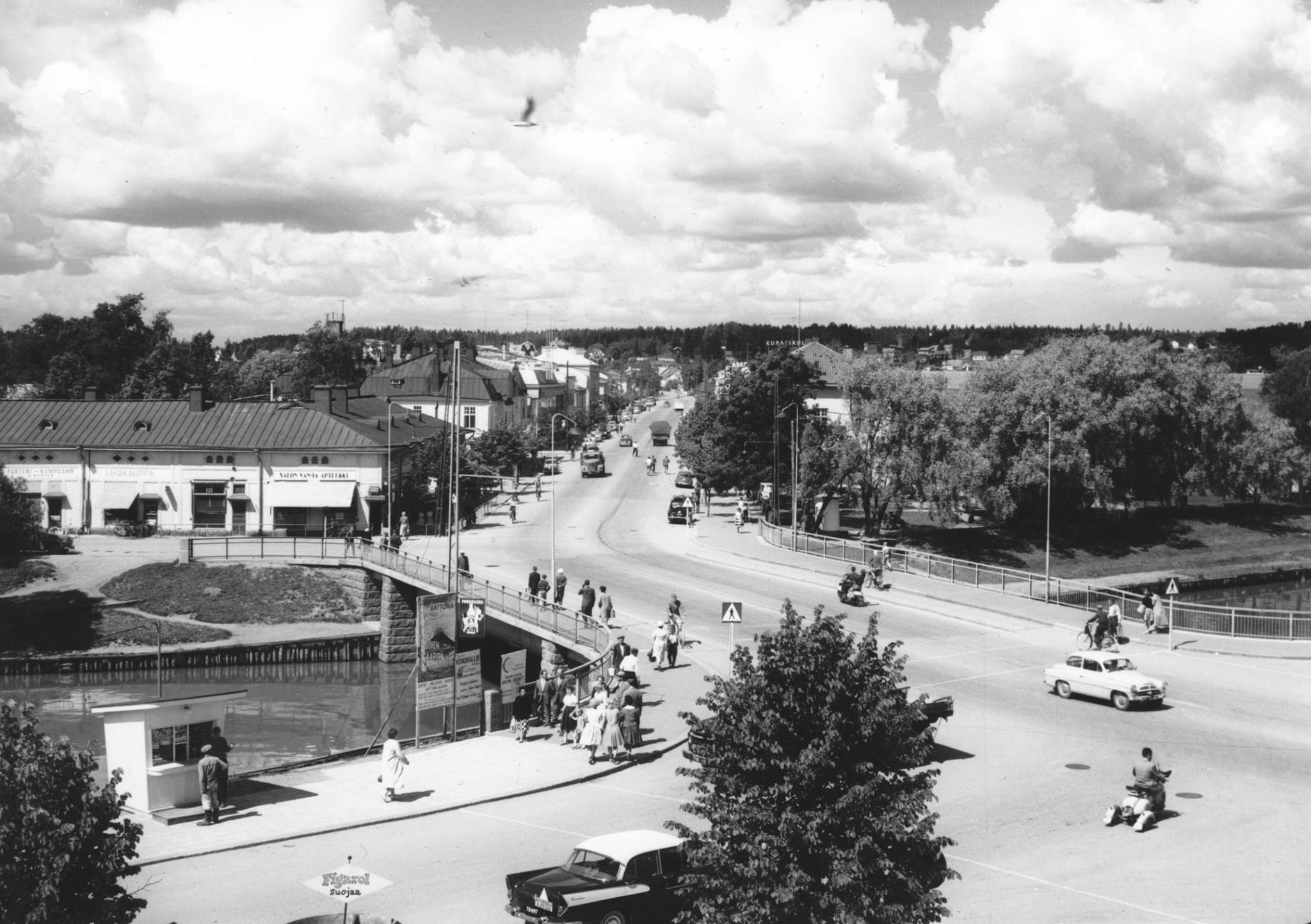 Salonjoen silta ja torilla oleva kioski